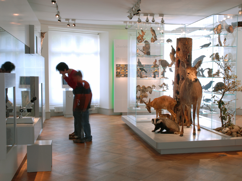 Naturmuseum Thurgau Dauerausstellung Lebensraum Wald